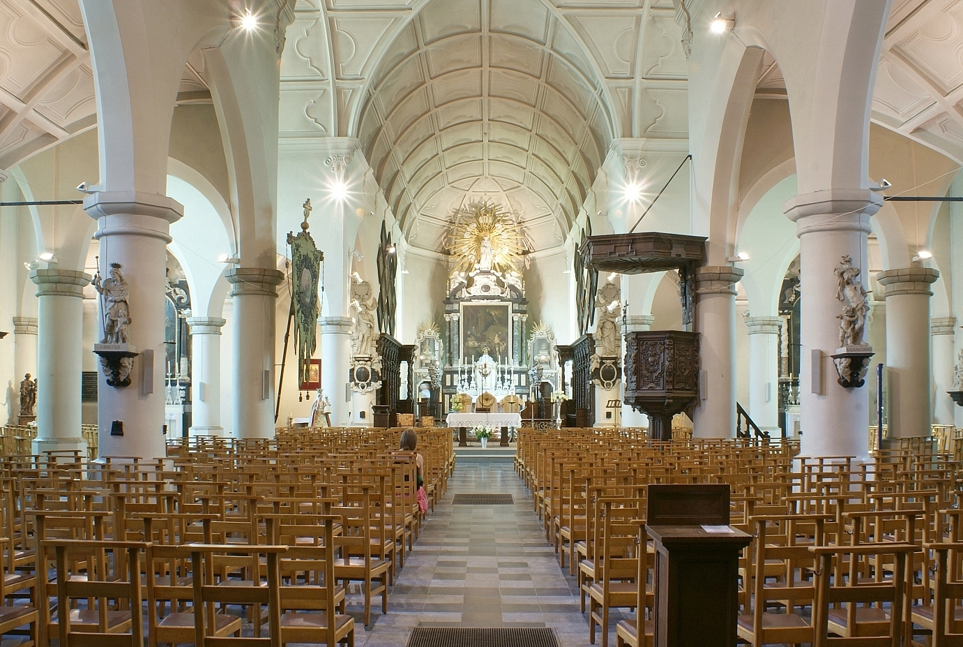 Parochiekerk Sint-Benedictus (Mortsel) - Interieur